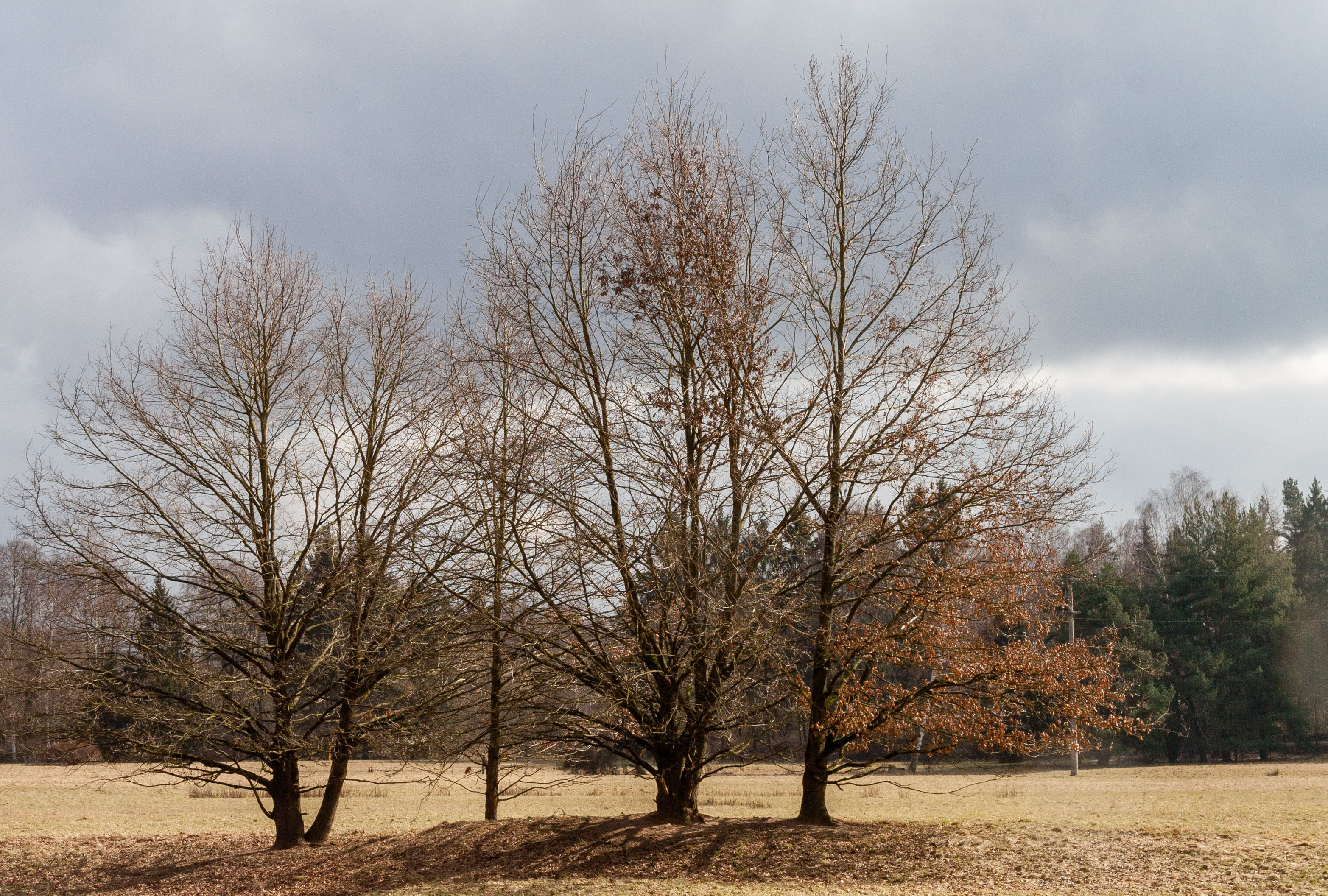 Pegnitz, Nürnberg, Landschaftsschutzgebiet